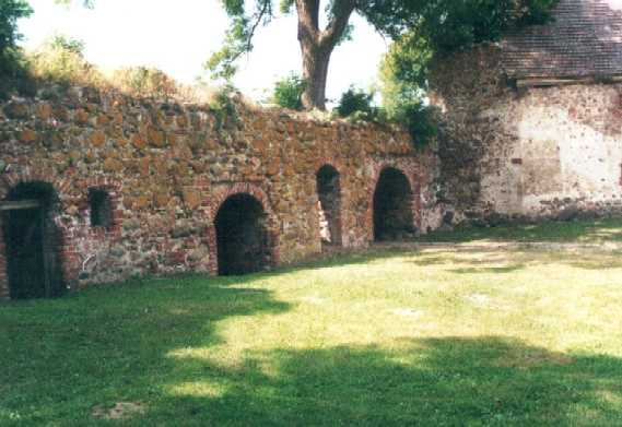 Festung Spantekow: Große Kasematte, Hofansicht / Great Casemate, view inner side